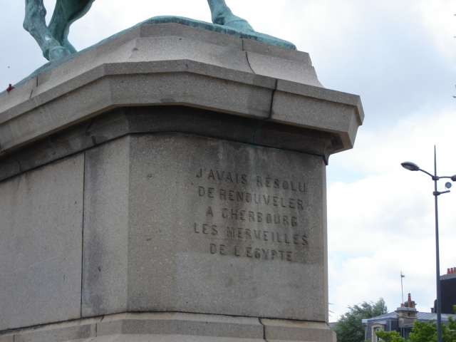 Détail du socle de la statue équestre de Napoléon, à Cherbourg, avec la citation de l'empereur : "J'avais résolu de renouveler à Cherbourg les merveilles de l'Égypte".